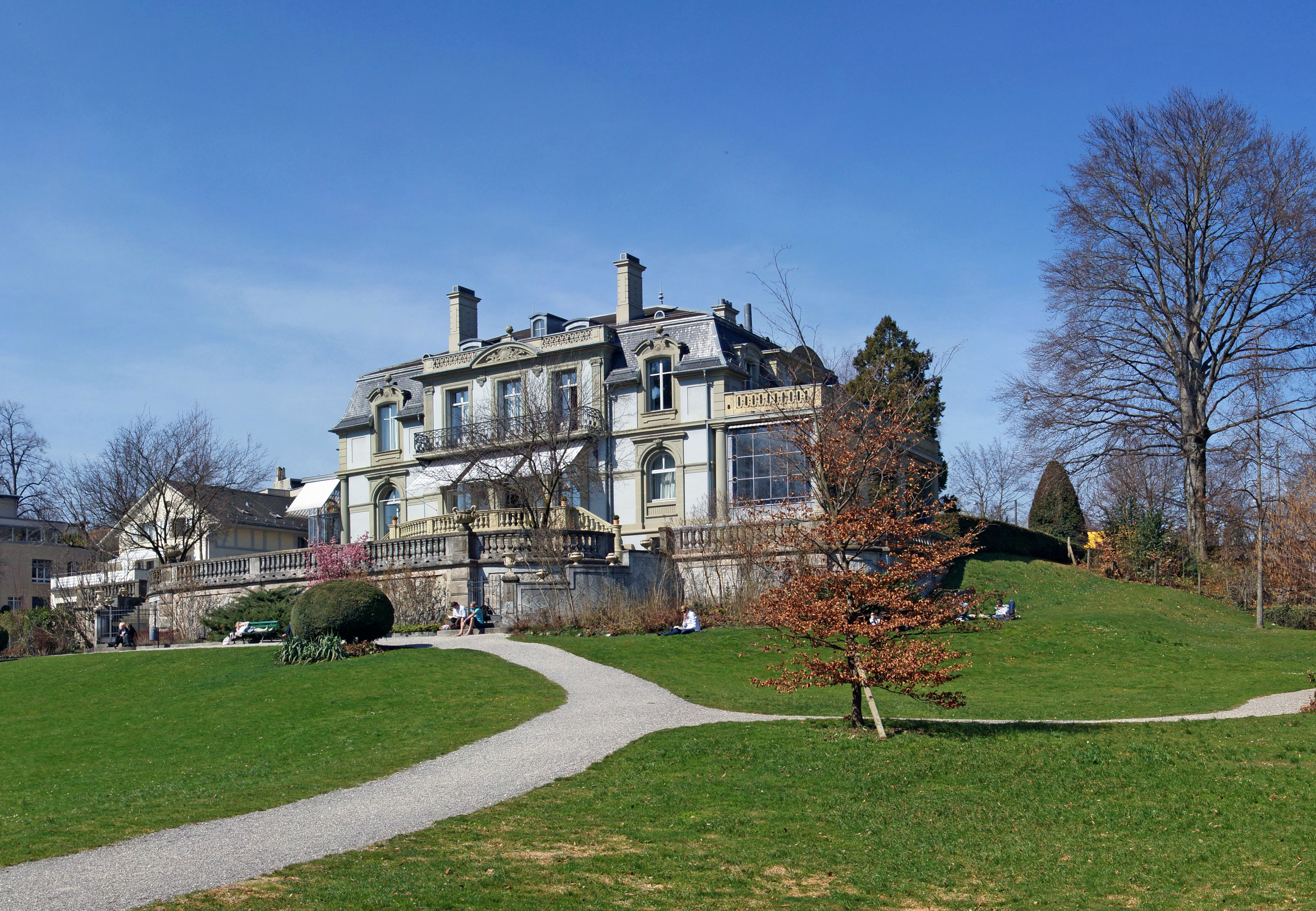 Kocherpark West Bern Bildausschnitt